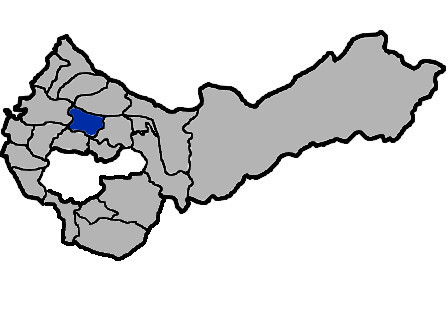 臺灣省臺中縣神岡鄉，本人essolo依照KaurJmeb的底圖，於2005年6月創作。